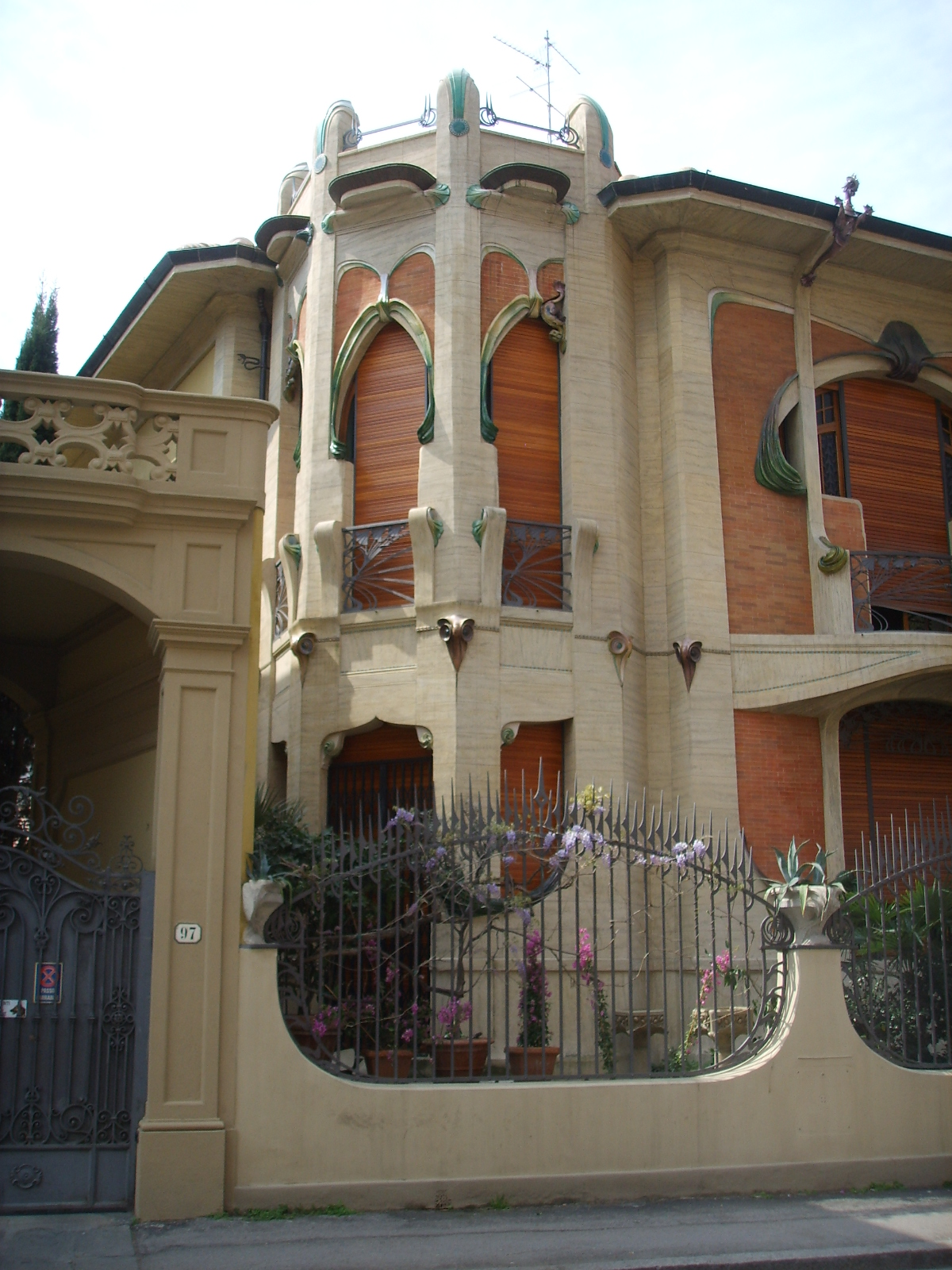 Villino_Broggi-Caraceni